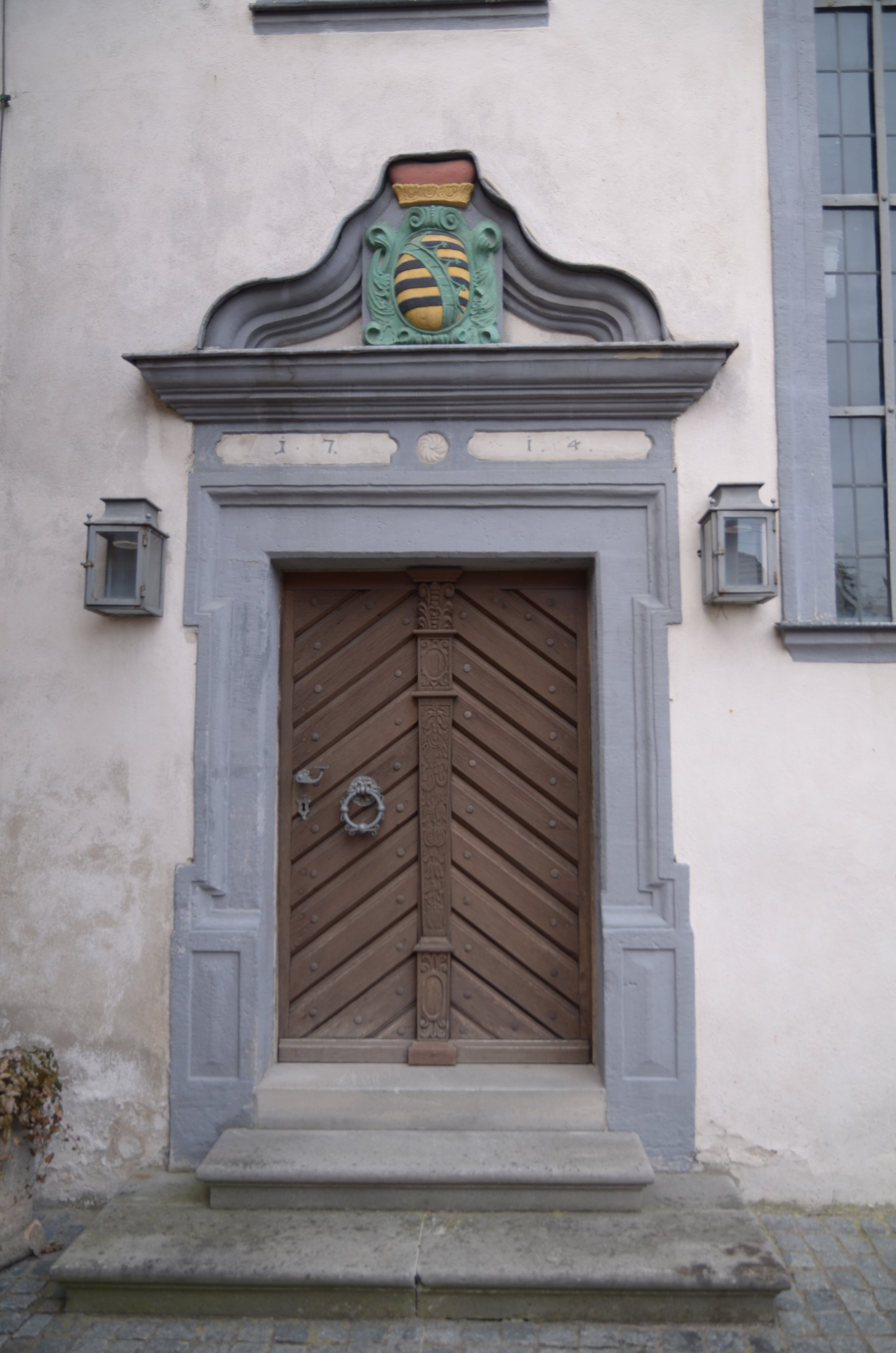 Kirche St. Georg in Hellingen Eingangsportal